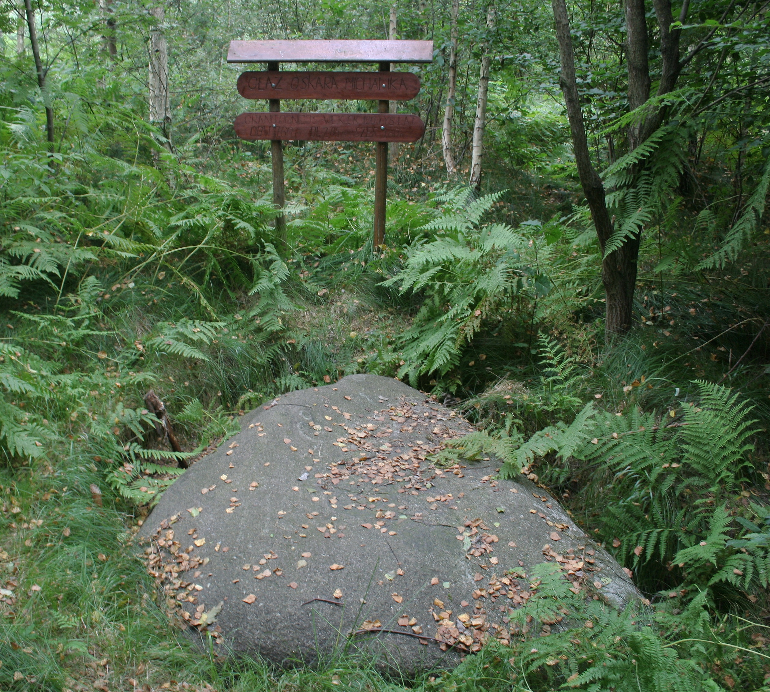 Głaz Oskara Michalika jest głazem narzutowym pochodzenia skandynawskiego, który został uznany za pomnik przyrody nieożywionej w 1998 roku. Głaz znajduje się na terenie Rybnika.